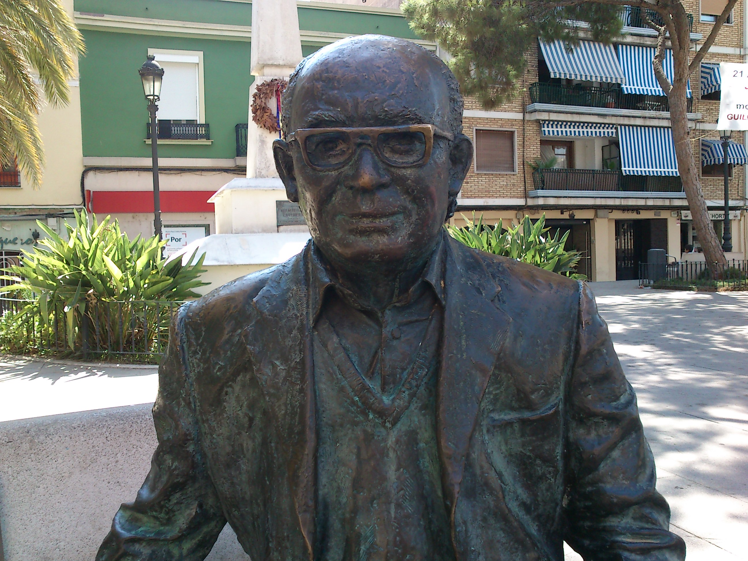 Estatua en bronce del poeta valenciano Vicent Andrés Estellés en su emplazamiento habitual, en la plaza Emilio Castelar de Burjassot, València. La autora de la obra es Teresa Cháfer, y en su patilla izquierda, de otro color, puede apreciarse la restauración que le realizaran después de que vándalos blaveros la hubieran atacado.